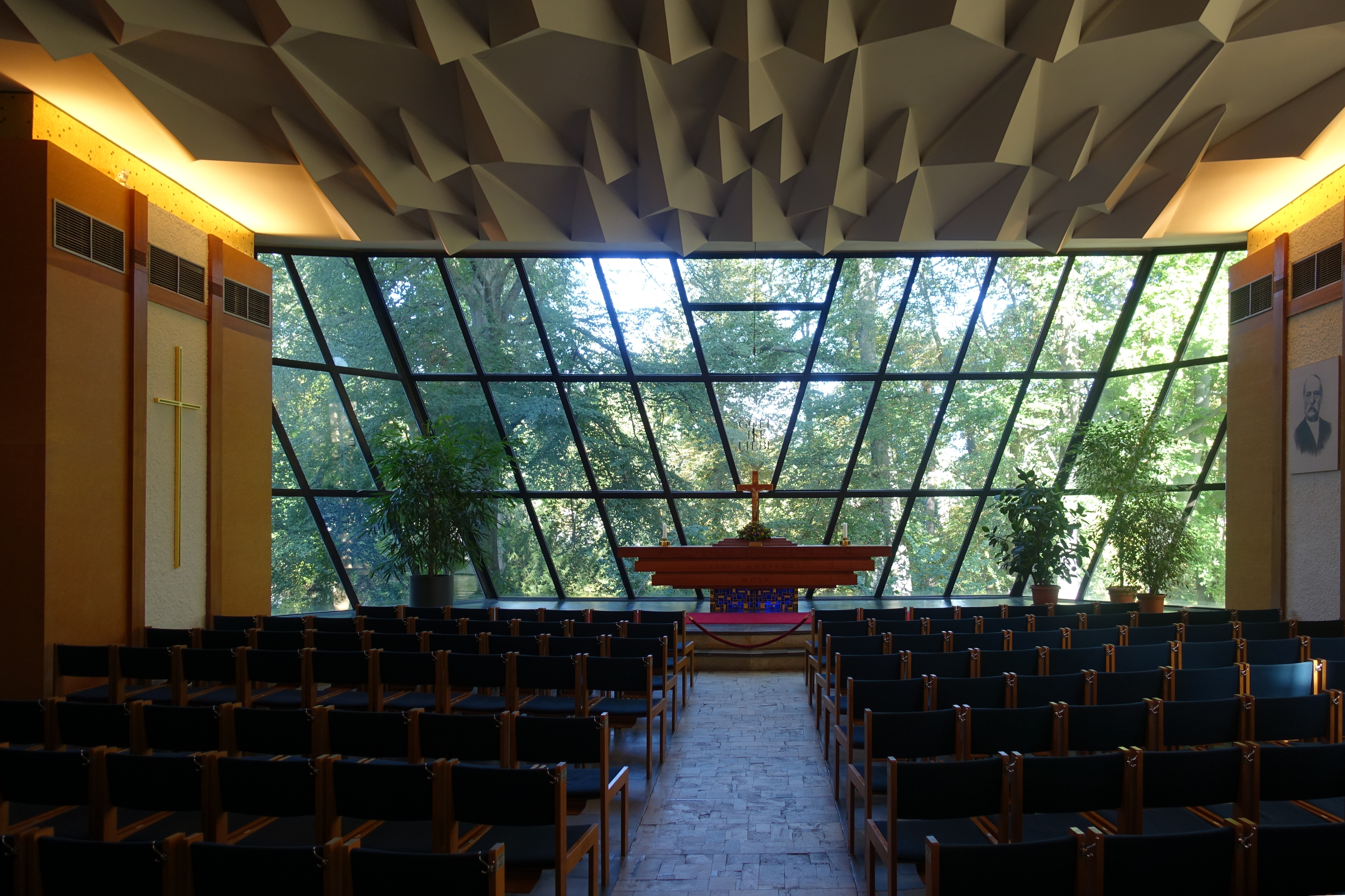 Kirchsaal und Altarraum